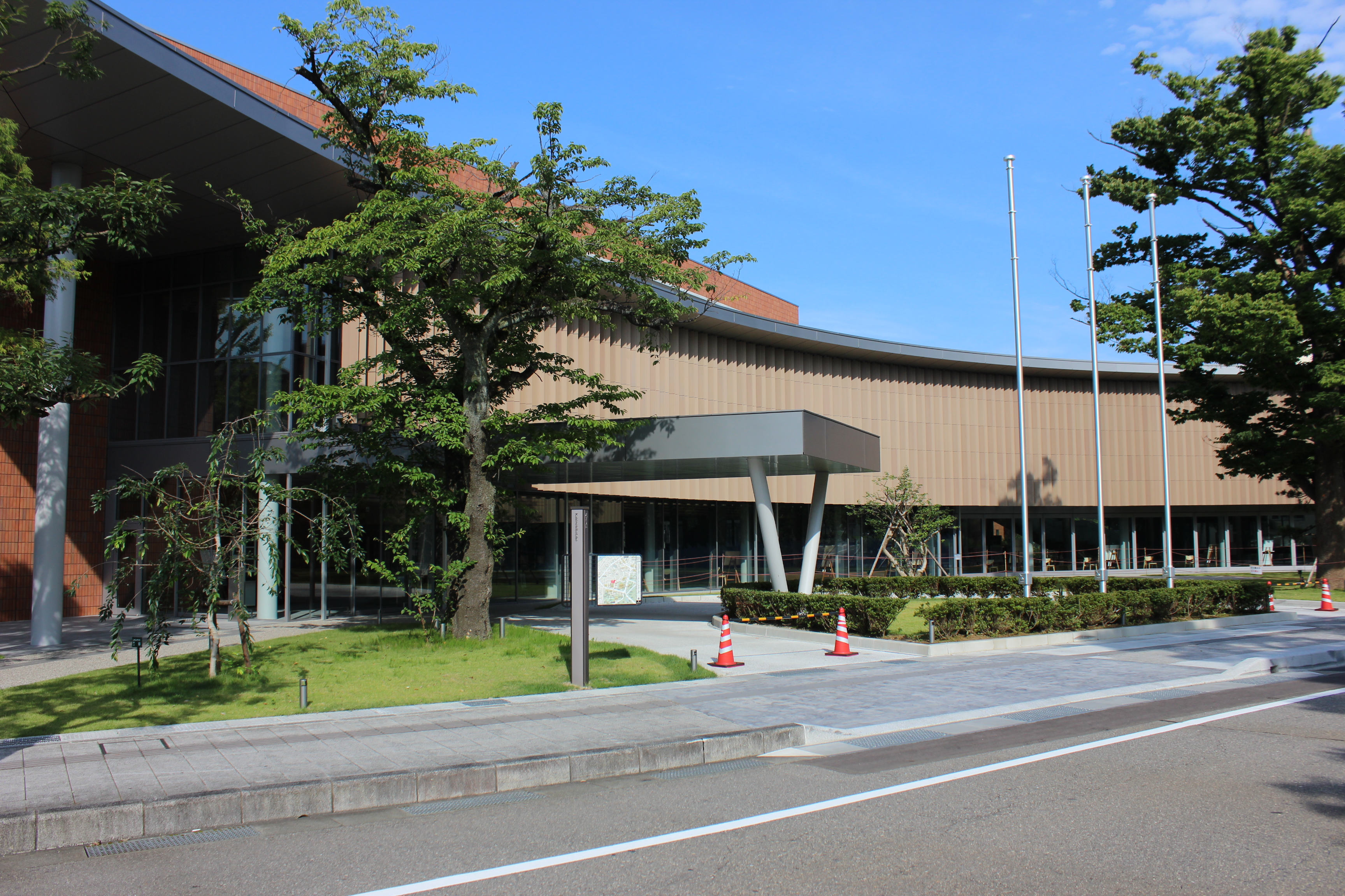 金沢市役所第2本庁舎